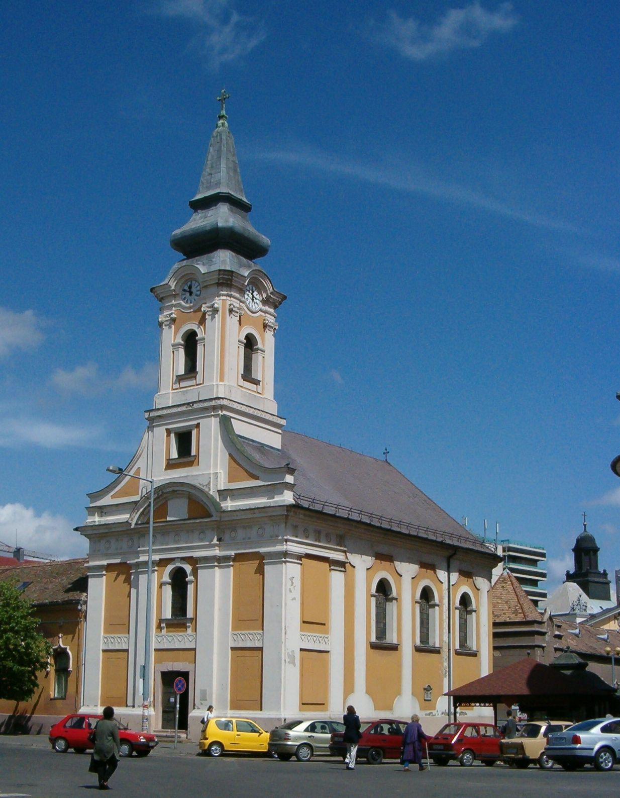 Görögkeleti templom (Szentháromság) (Kecskemét, Széchenyi tér)